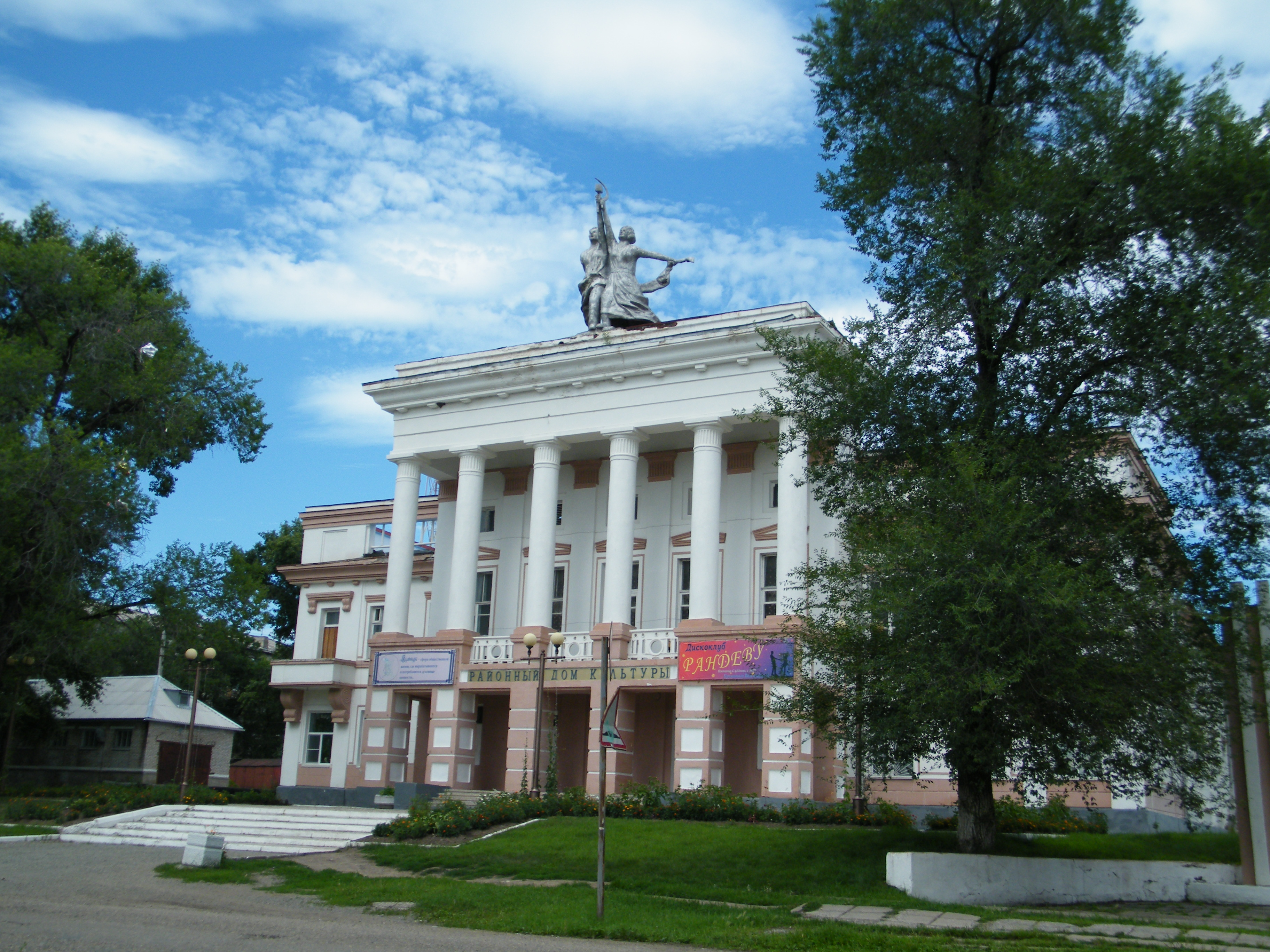 Бикин, районный дом культуры